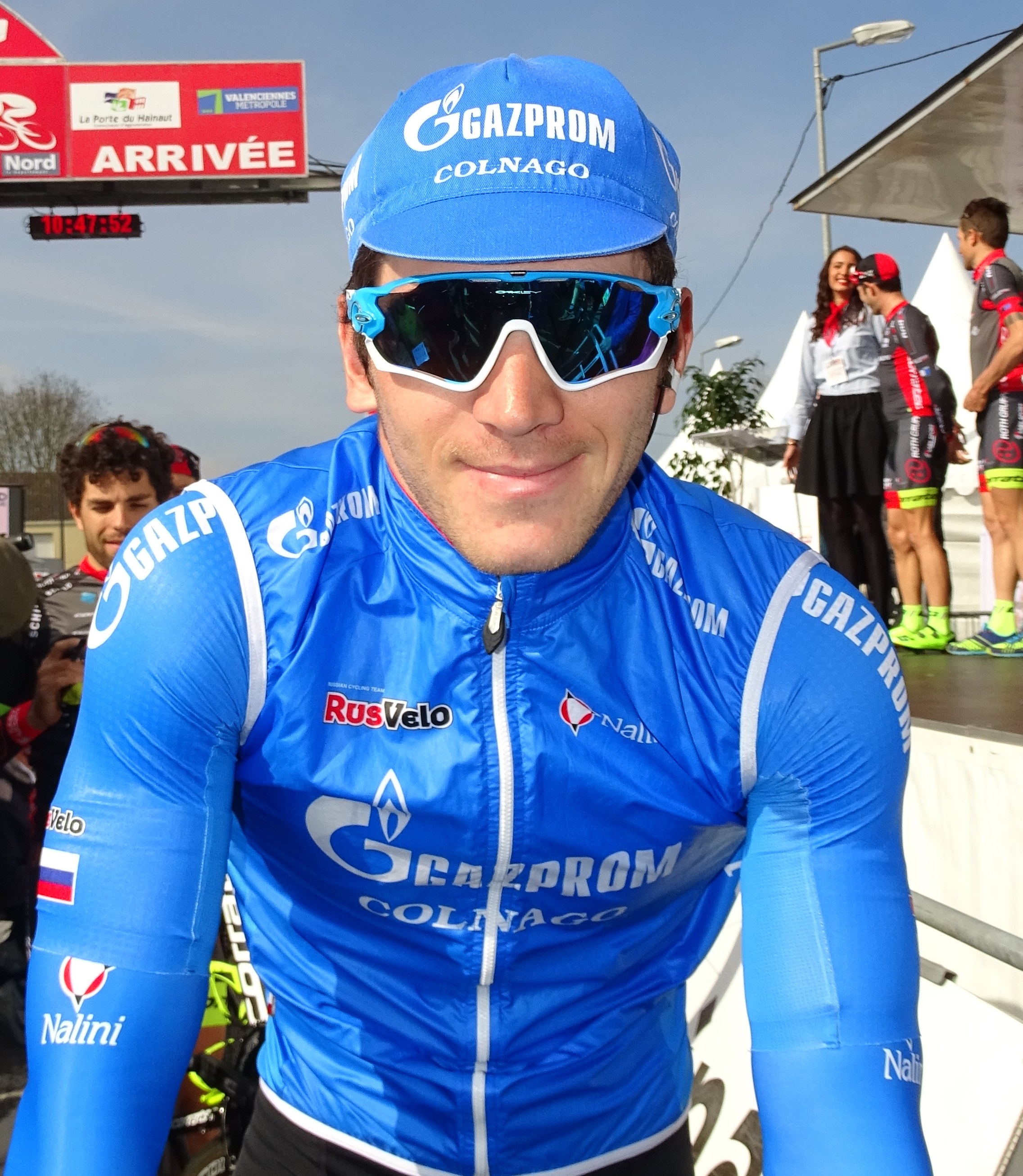 Reportage réalisé le jeudi 14 avril à l'occasion du départ et de l'arrivée du Grand Prix de Denain 2016 à Denain, Nord, Nord-Pas-de-Calais-Picardie, France.